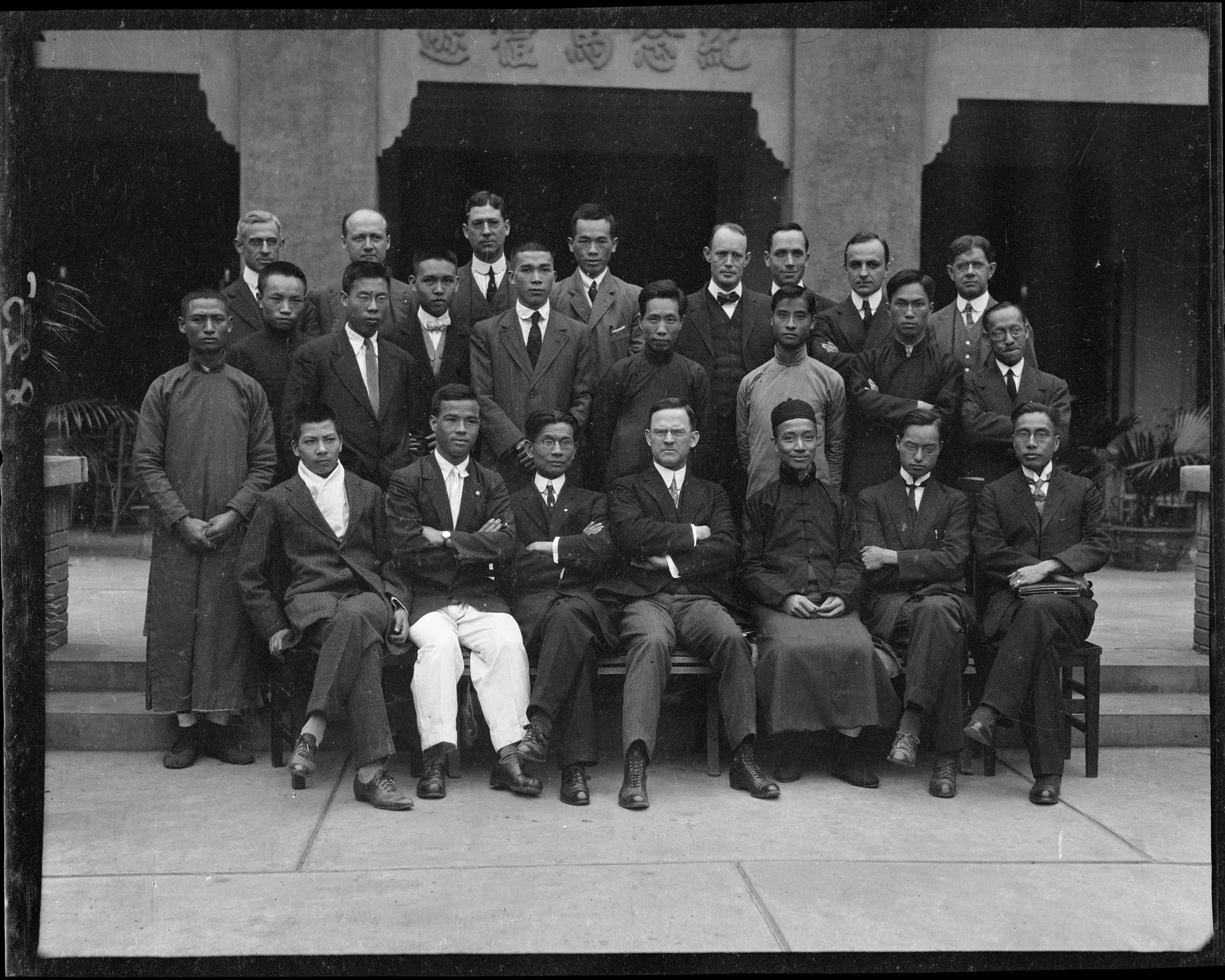 廣州基督教青年會長堤會所前的幹事們，目前長堤會所已被清拆。